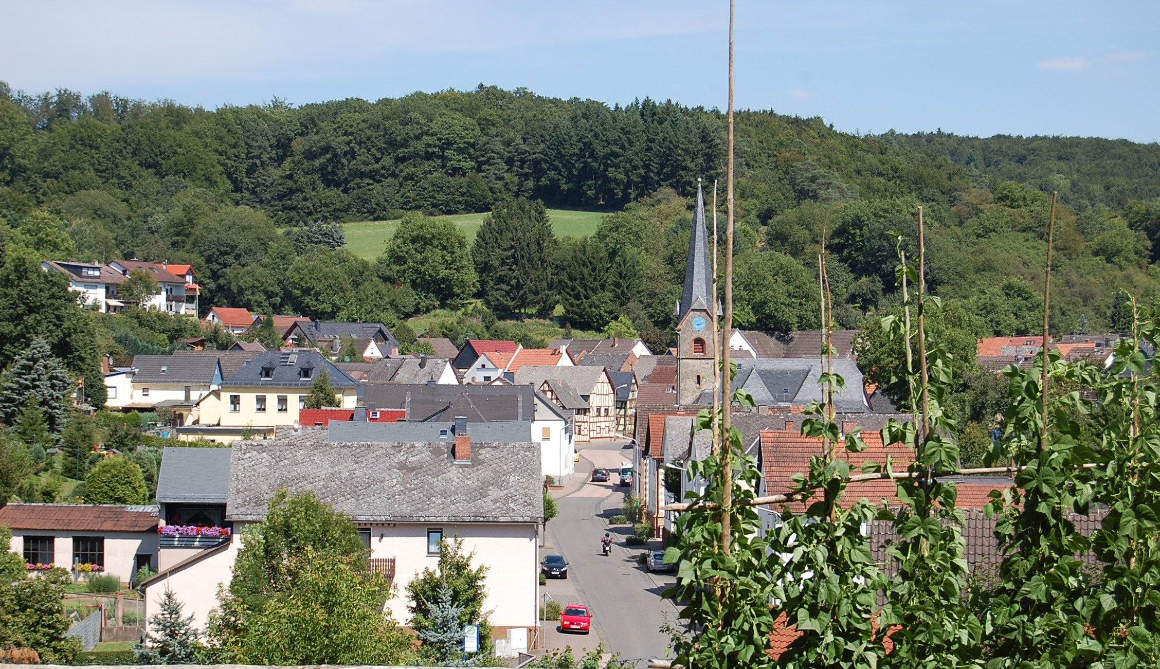 Blick über Drommershausen